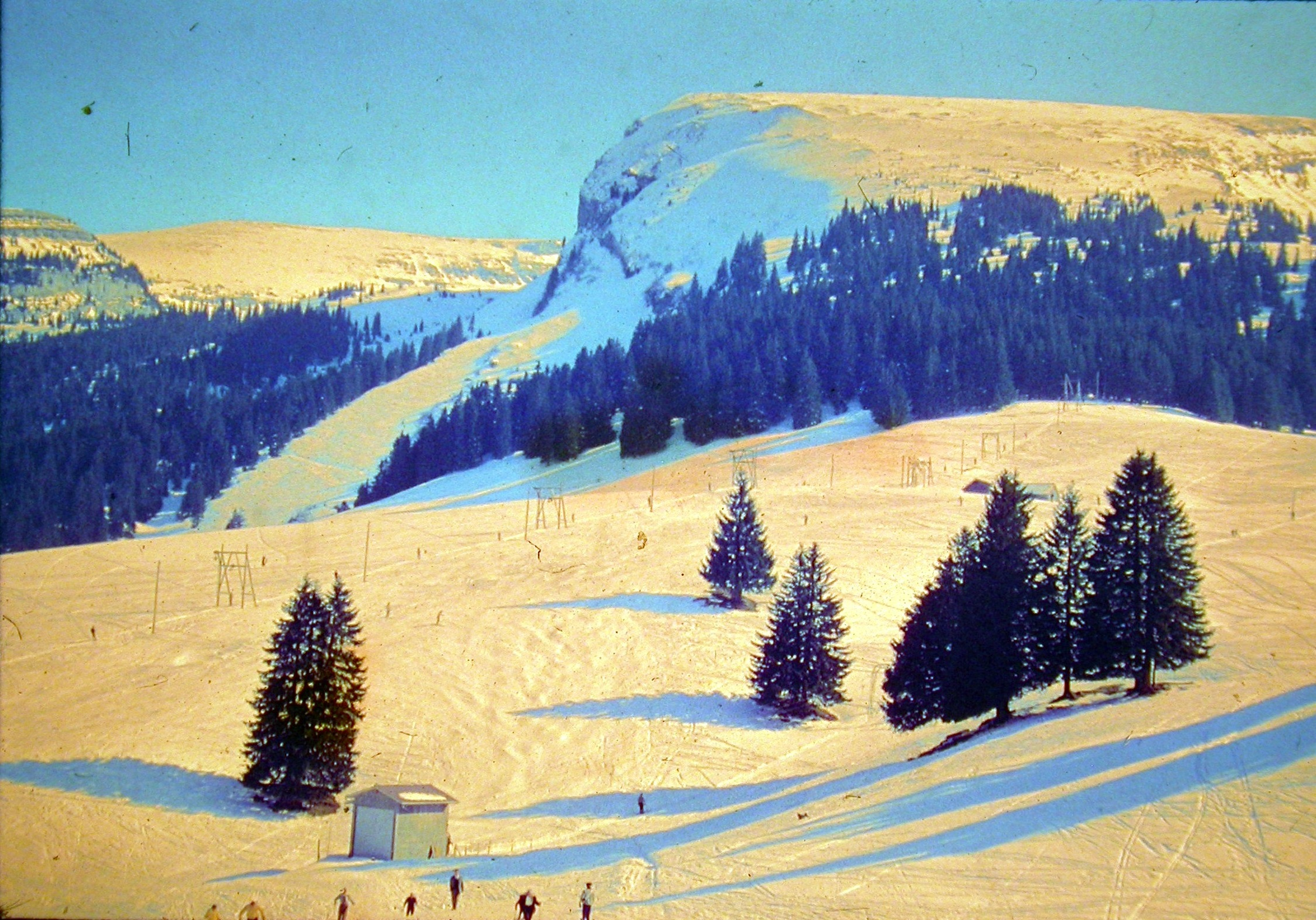 Toggenburg 60er-Jahre Iltios